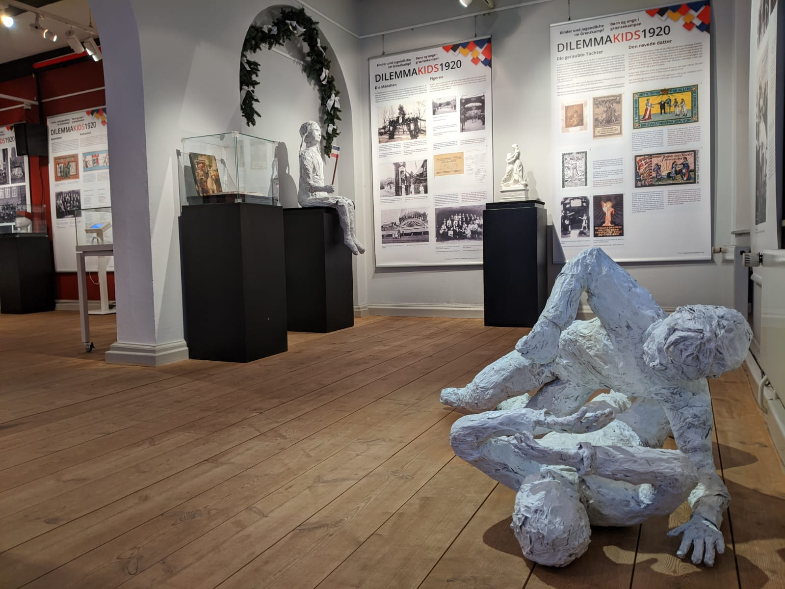 Pappmaché Figuren von Christiane Altzweig in der Ausstellung Dilemma-Kids der Dänischen Zentralbibliothek für Südschleswig und des Stadtmuseums Schleswig